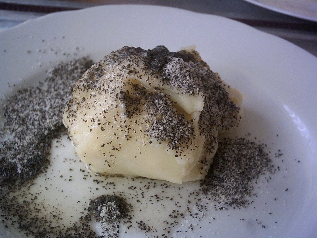 Škubánky s mákem, školní jídelna Dolní Žandov